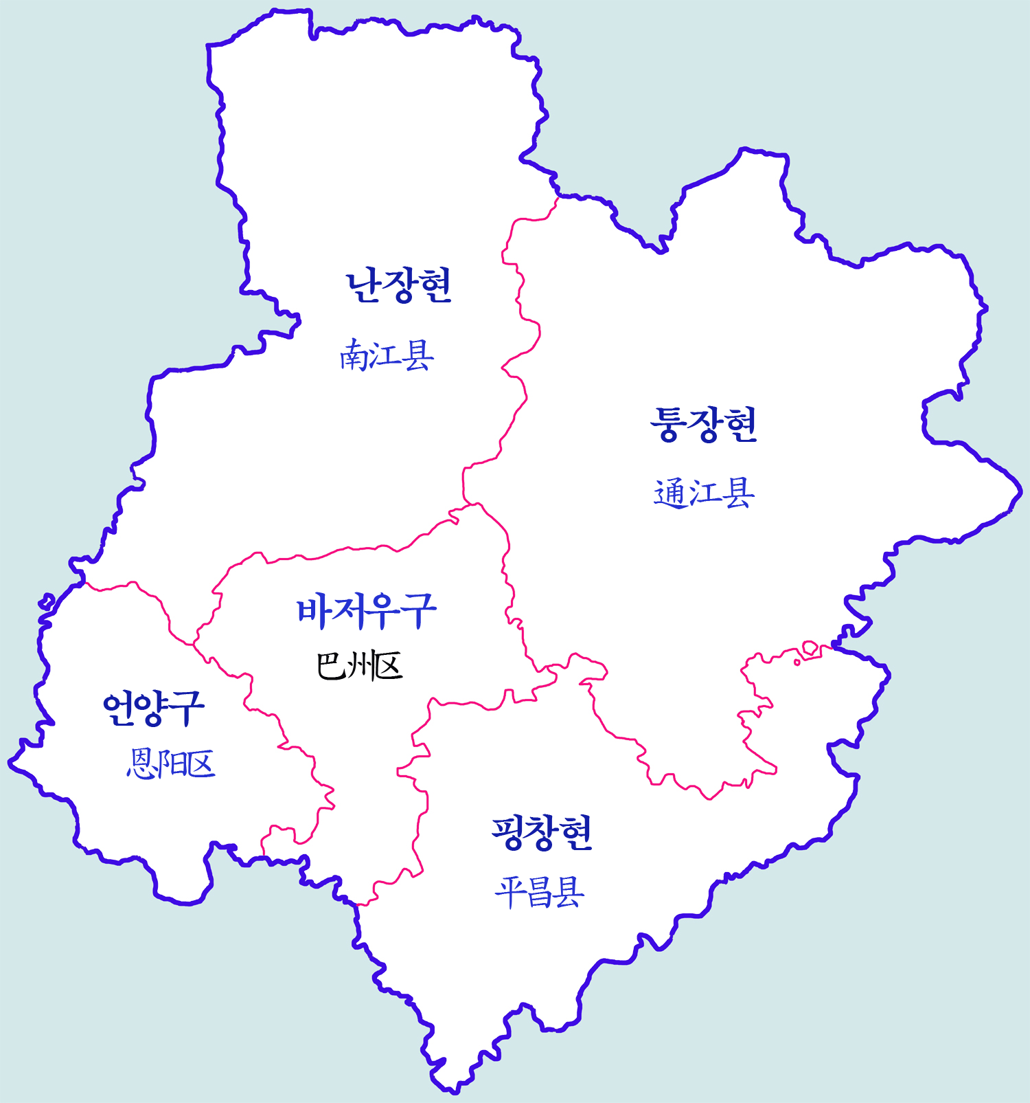 바중시 현급구역도